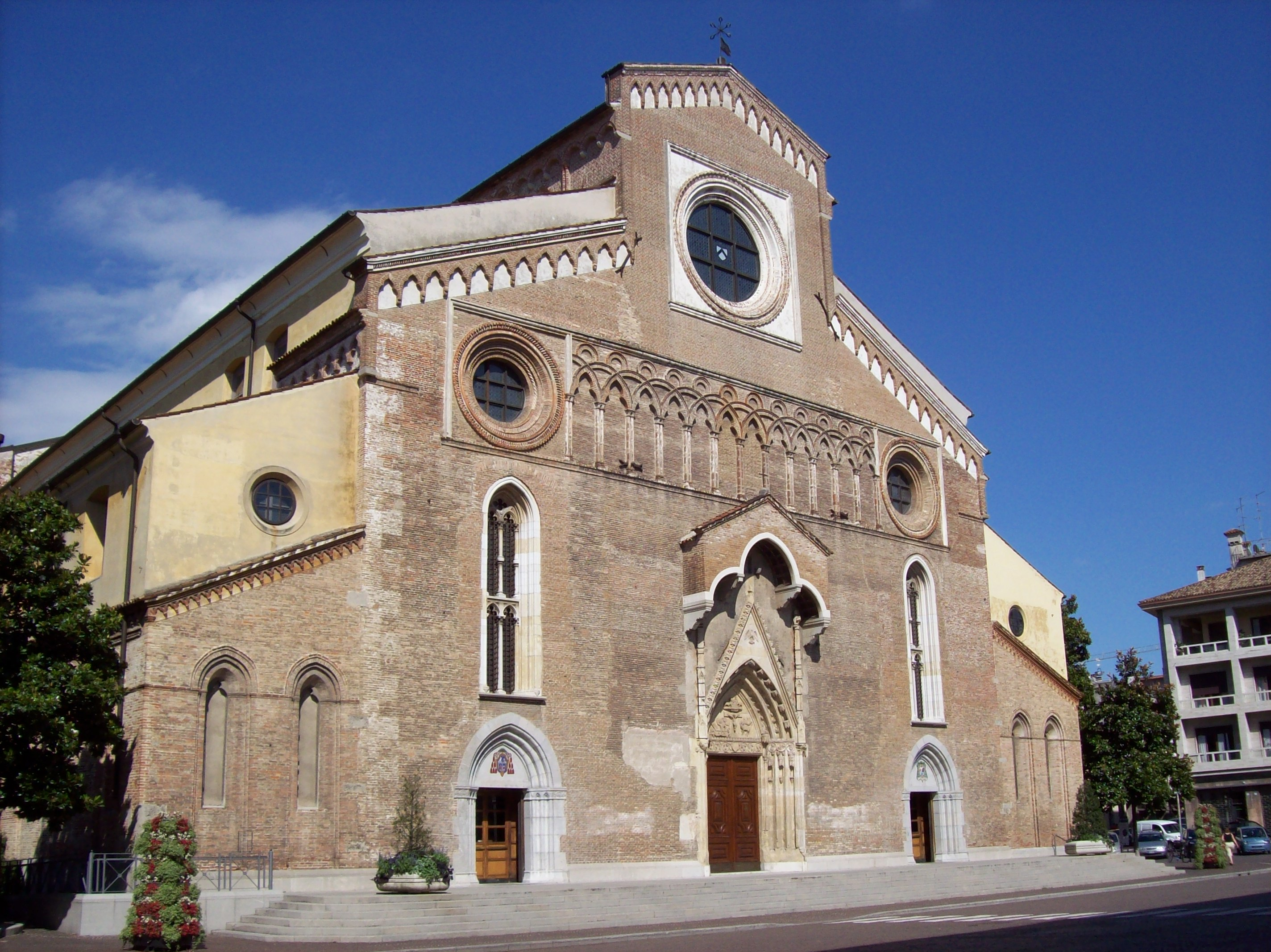 Duomo di Udine - facciata